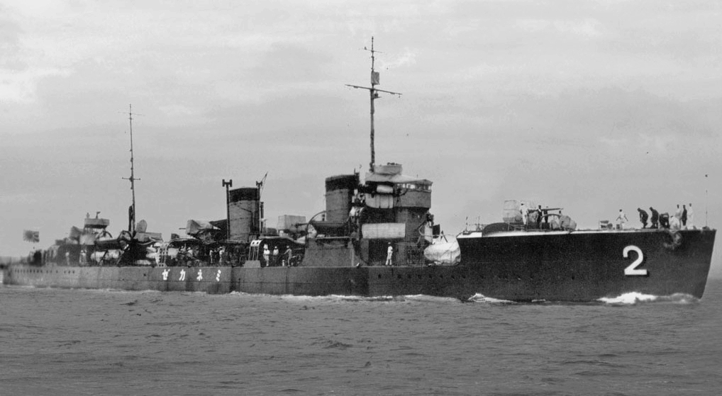 Imperial Japanese Navy destroyer Minekaze at Yokosuka.